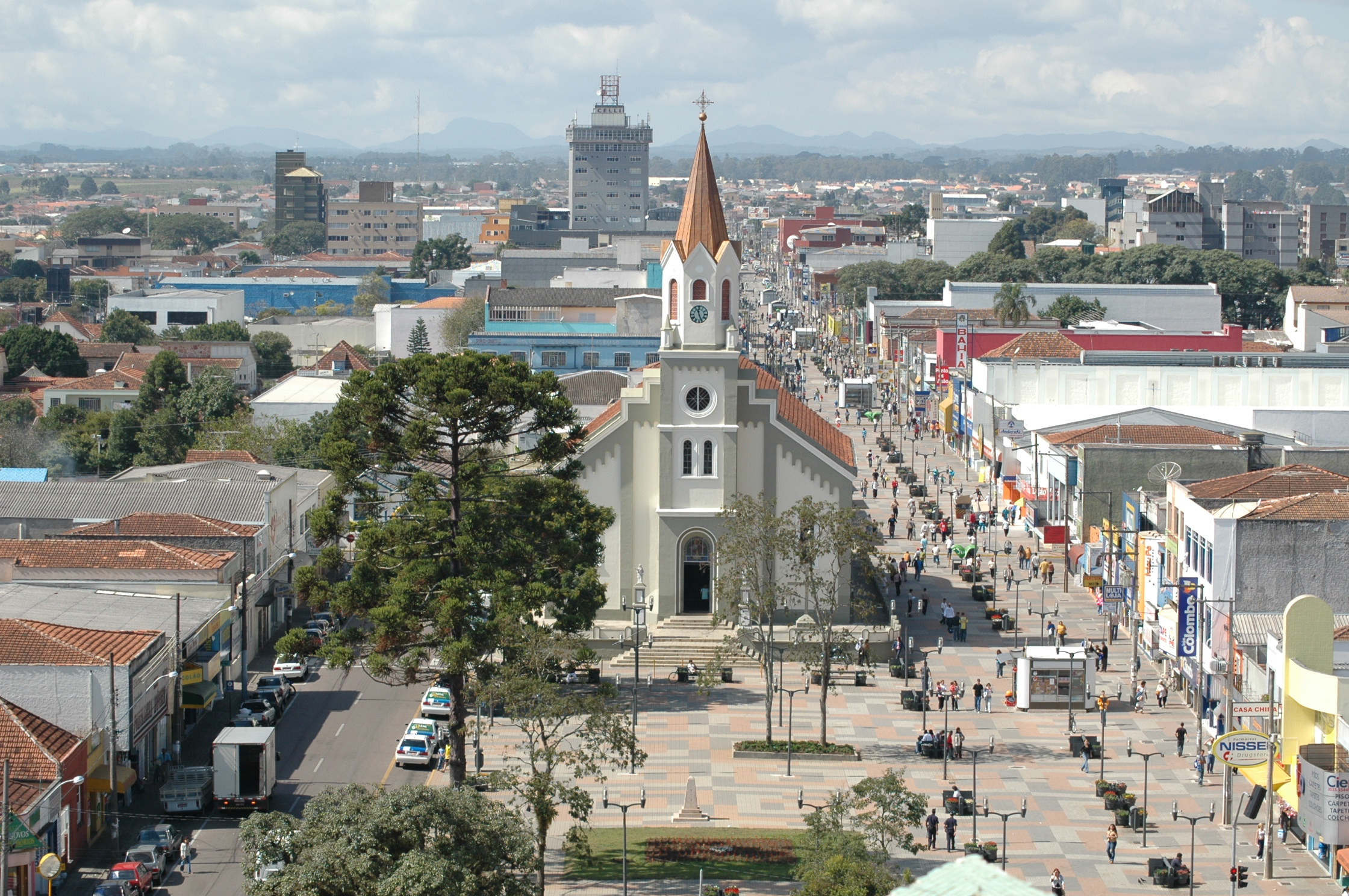 Centro, São José dos Pinhais - PR, Brazil